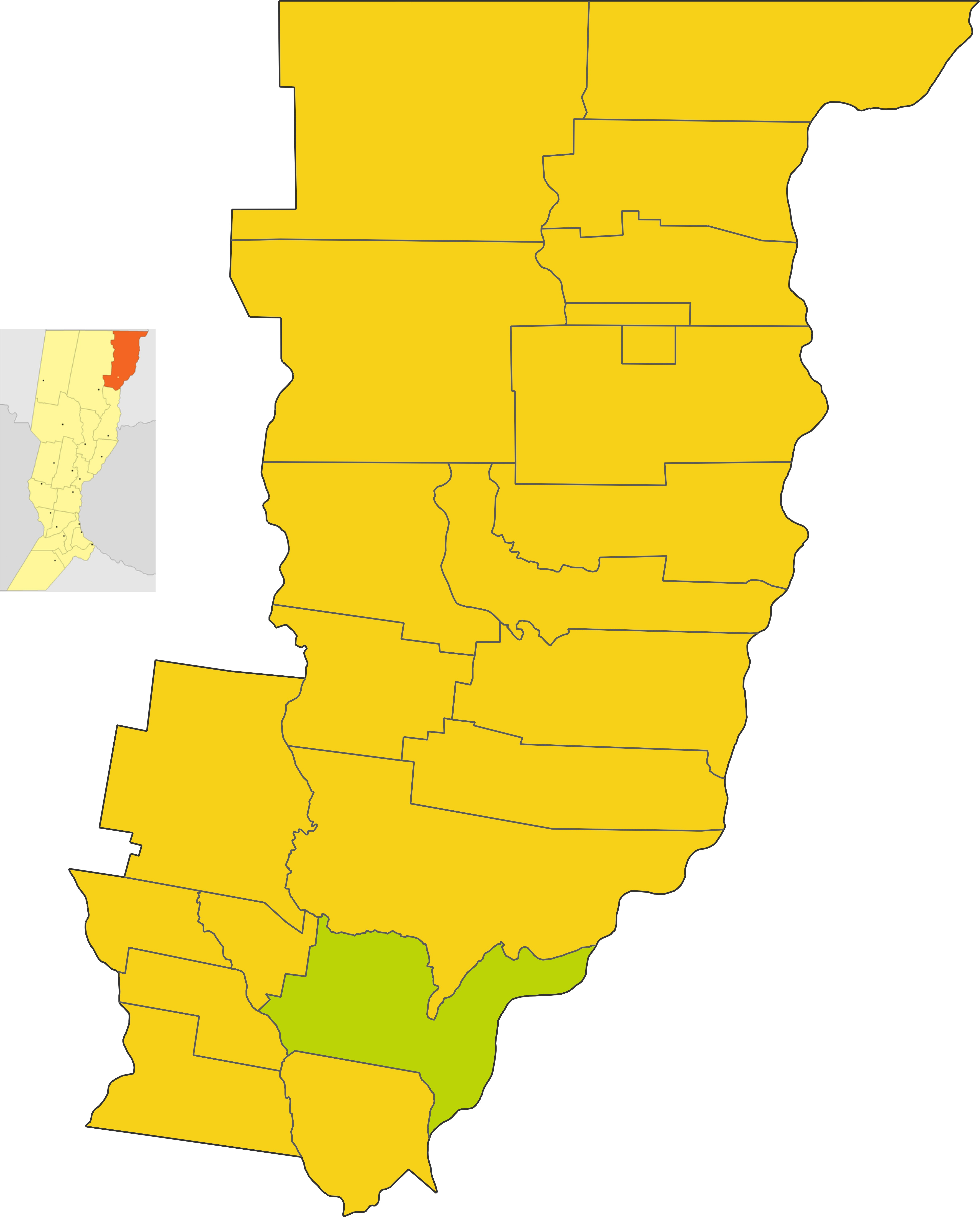 Map of the municipio de Reconquista in General Obligado department, Santa Fe province, Argentina